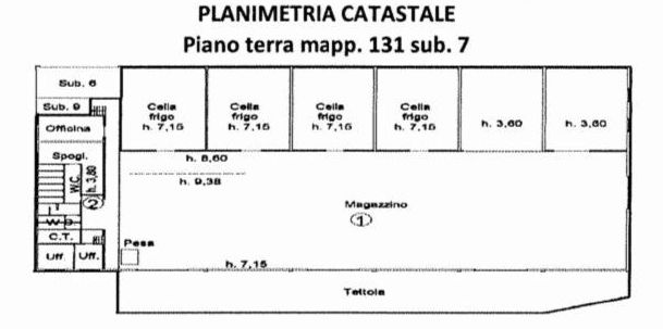 planimetrie adiacenze